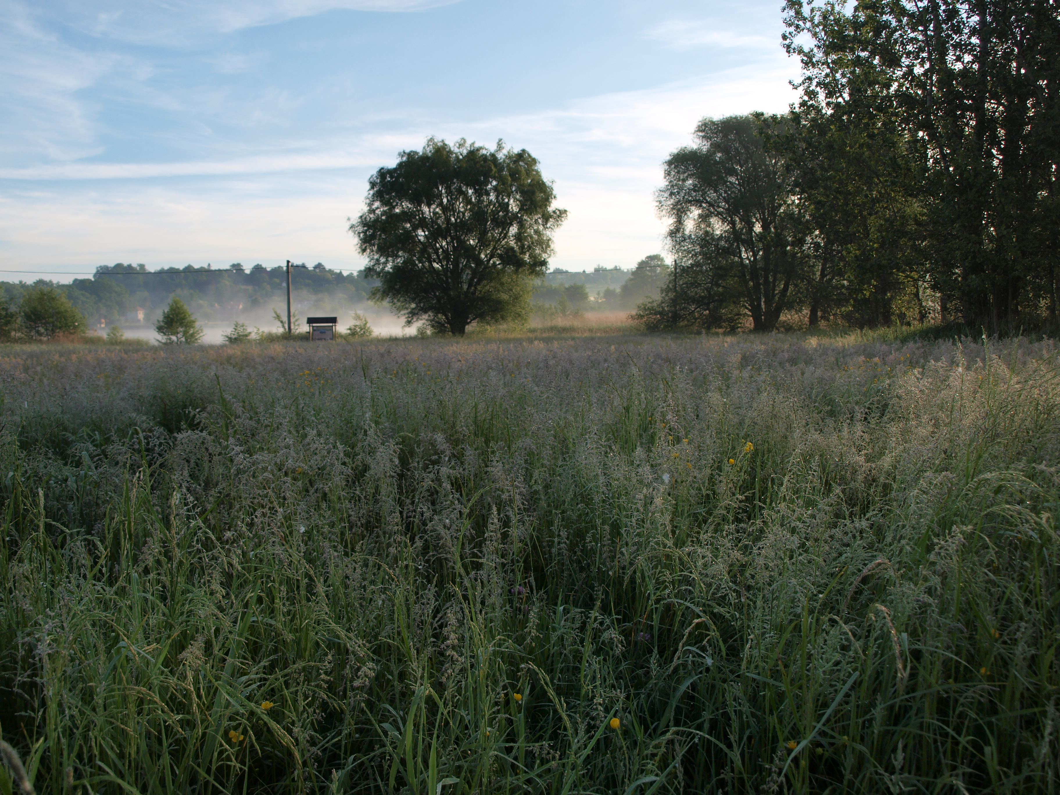 Vlhké louky PP Roudnička a Datlík, v sousedství intravilánu Roudničky, květen 2014.